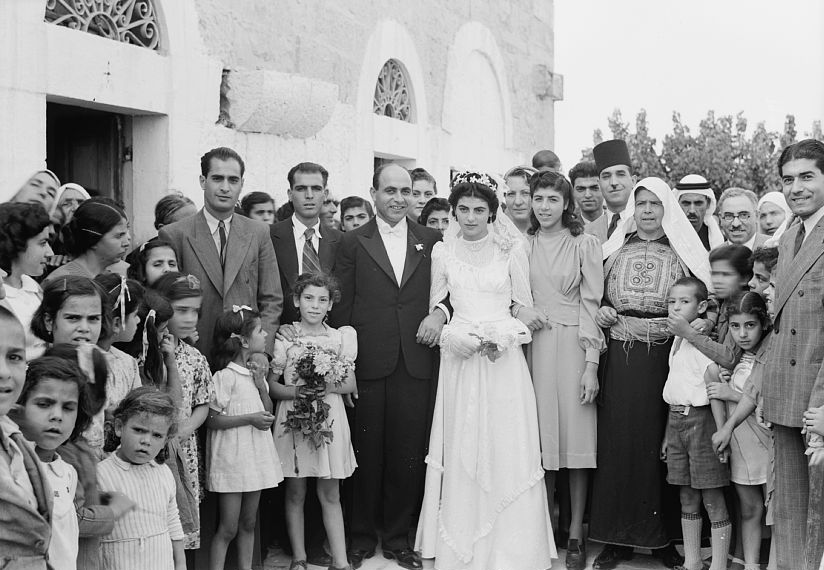 Christian wedding, Beit Jala near Jerusalem, Palestine